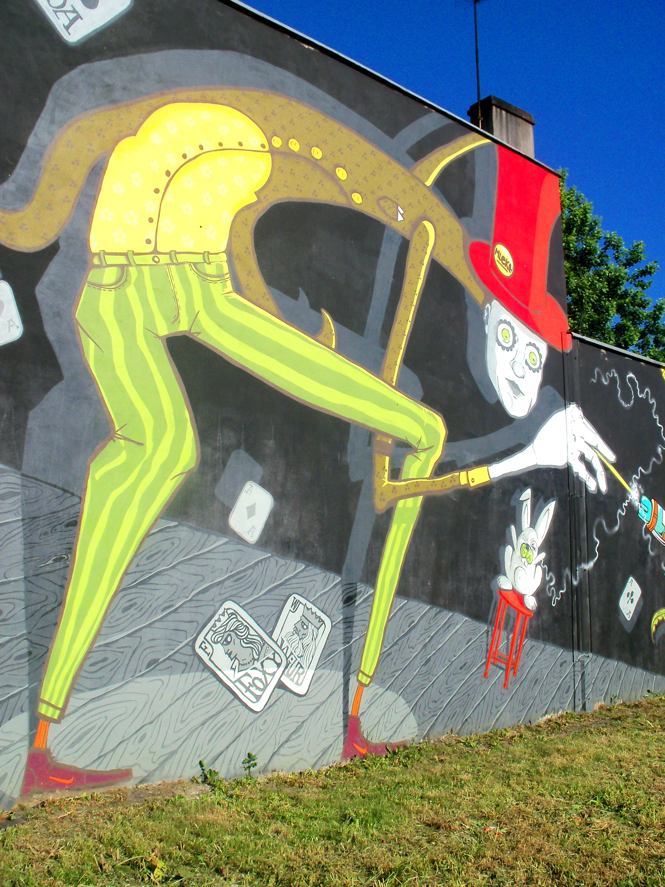 Graffiti na murze przy ul. Jerzego Dudy-Gracza w Katowicach